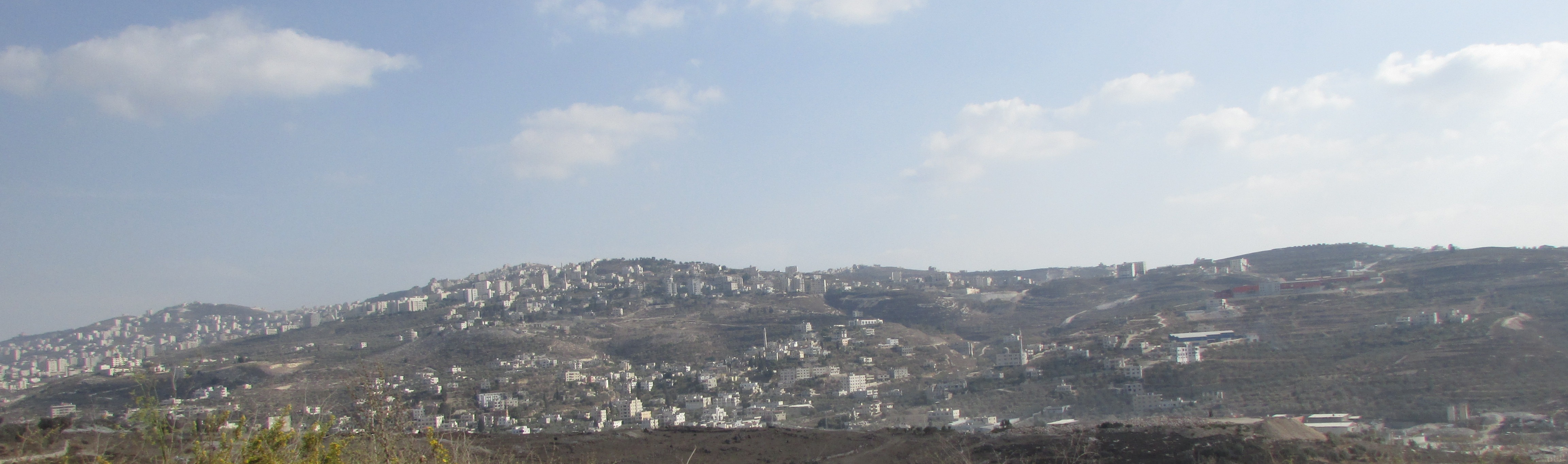 بيت وزن قرية فلسطينية تتبع محافظة نابلس في الضفة الغربية، تقع غرب مدينة نابلس. Beit Iba from the north. Behind are buildings of the extension west of Nablus on the road from Nablus to Tulkarm. On the left side there is a large unbuilt area. Above it is Rafidia. To the right is Beit Wazan. Further to the left is Nablus proper.